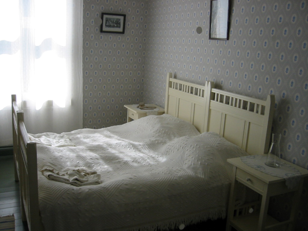 Norsk folkemuseum Oslo, Utstillingen «Ein norsk heim i ei ny tid»